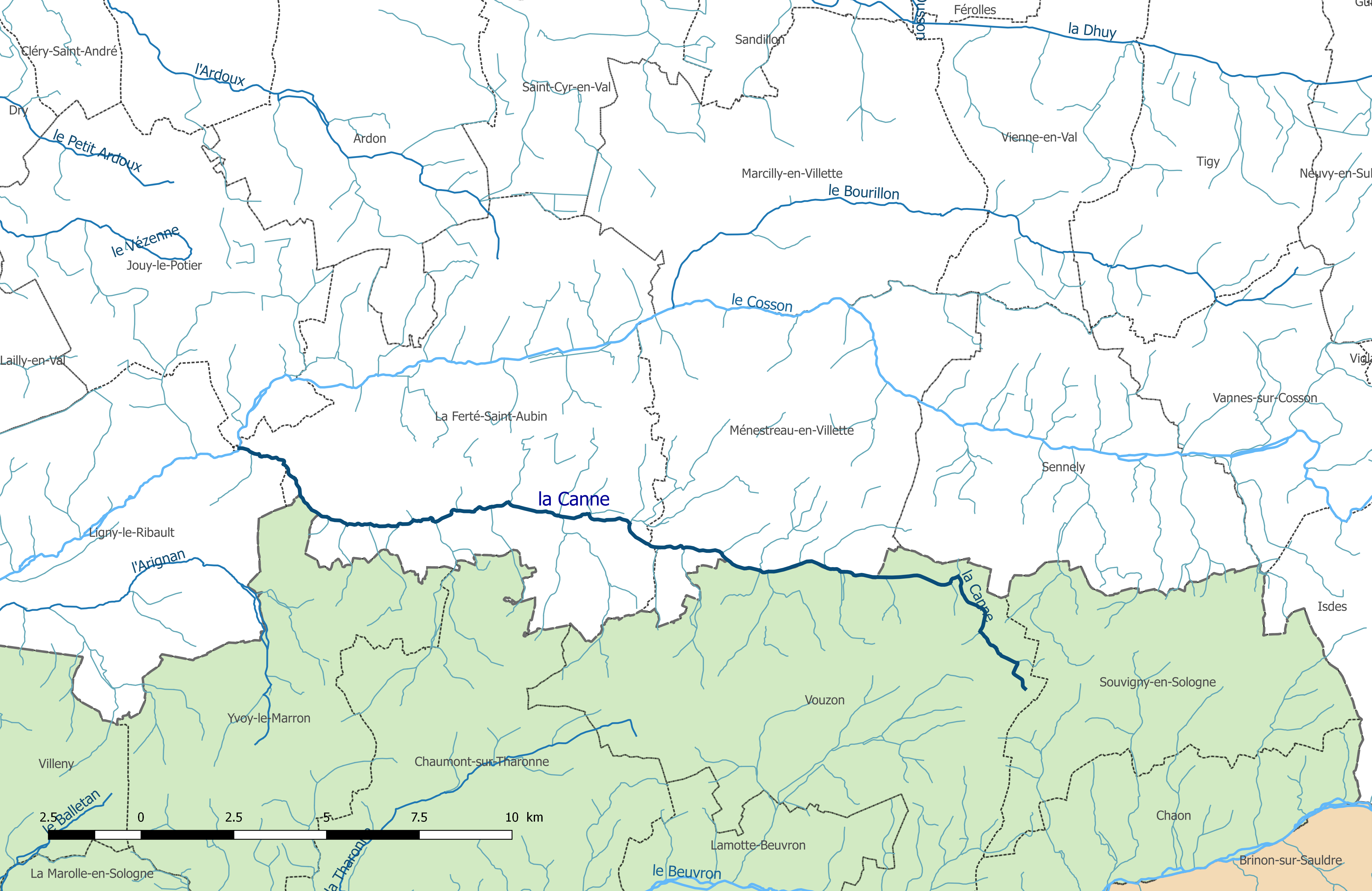 Carte du cours d'eau "la Canne" et de ses affluents, dans le département du Loiret.